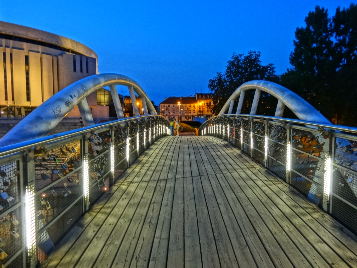 Kładka dla pieszych łącząca Wyspę Młyńską z Operą Nova i bulwarami nad Brdą